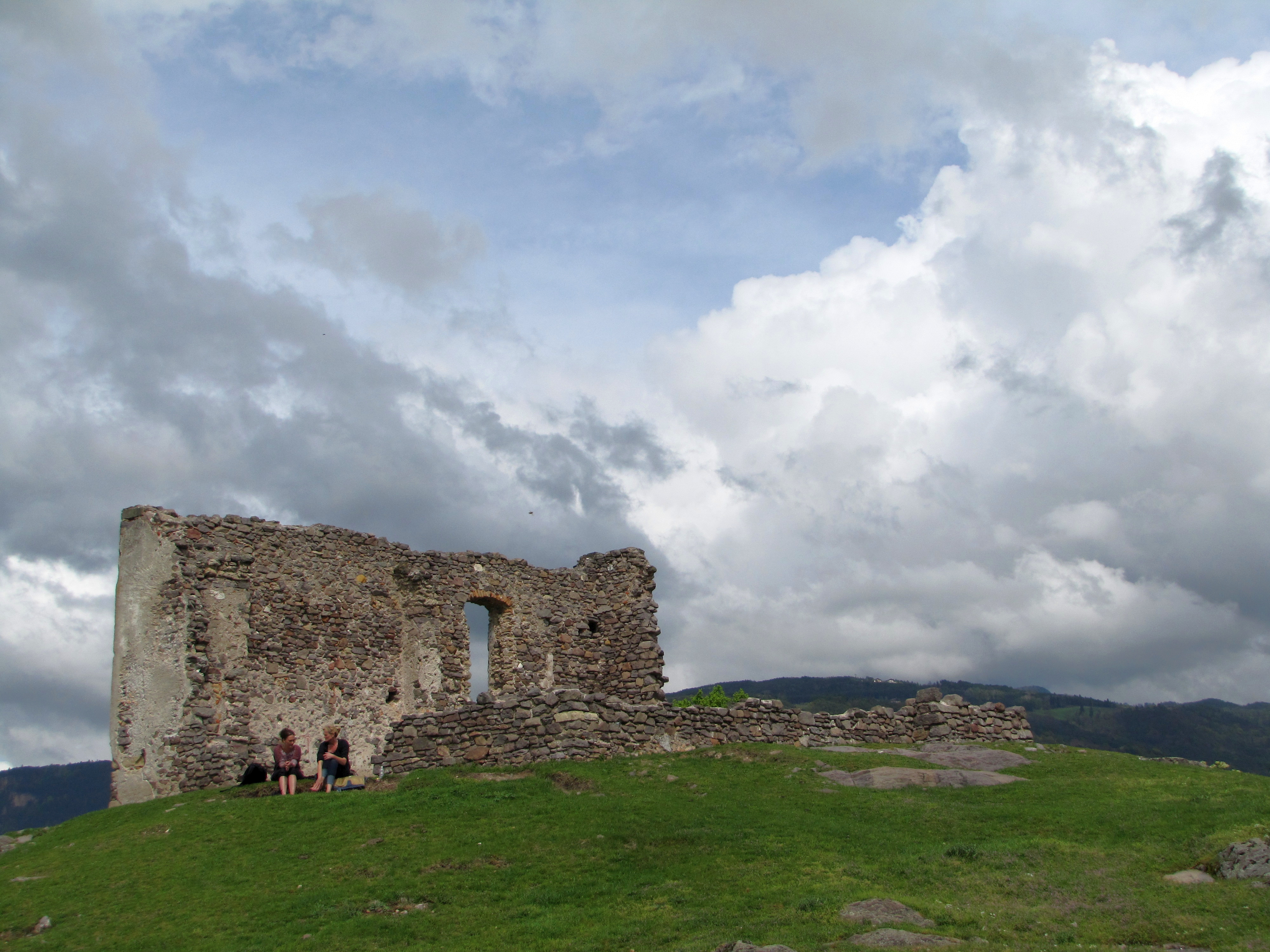 Castelfeder Barbarakapelle 2013